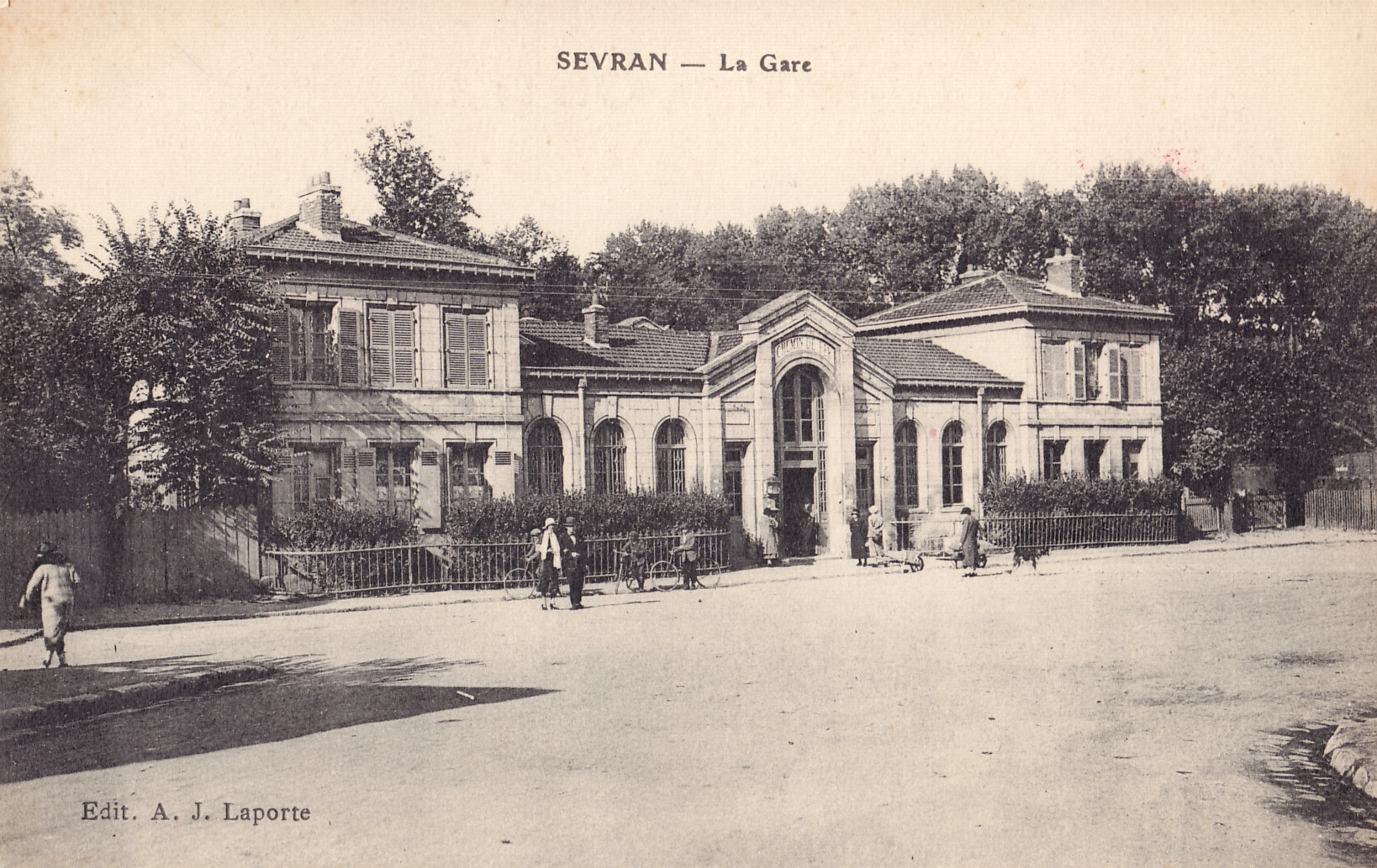 Carte postale ancienne éditée J. Laporte : SEVRAN - La Gare